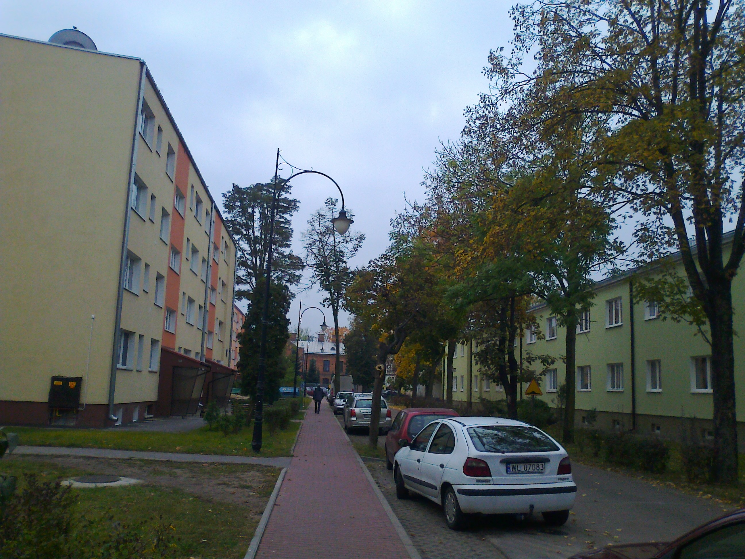 Osiedle Wojskowe w Zegrzu Południowym